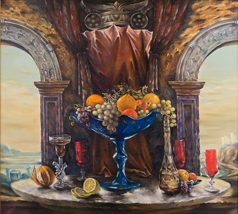 «Натюрморт у стилі італійського Відродження» (1998). Автор Мартиненко Анатолій Іванович